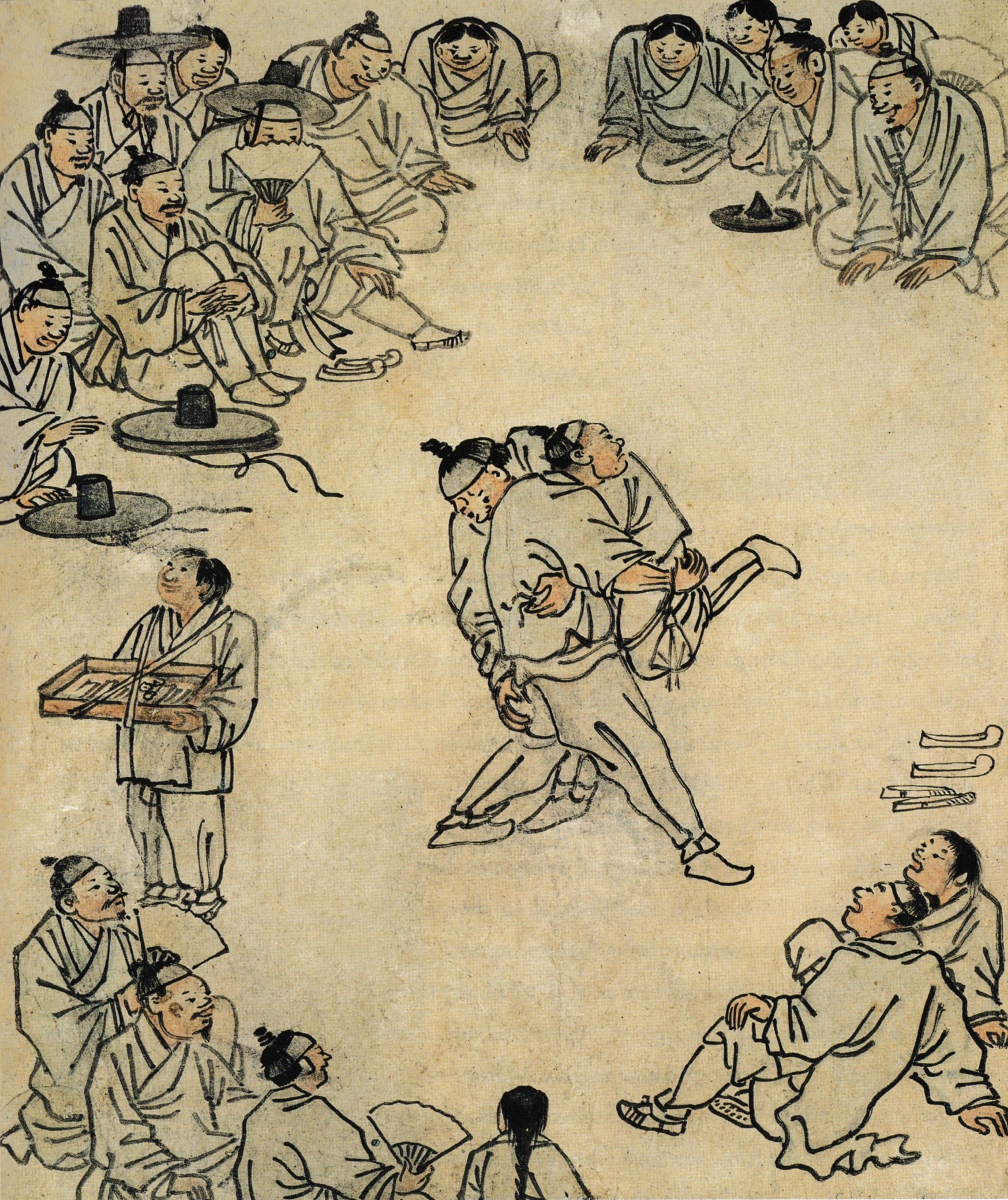 씨름(相撲), 단원풍속도첩(檀園風俗畵帖)에서 종이에담채, 27cm x 22.7cm, 국립 중앙박물관 소장